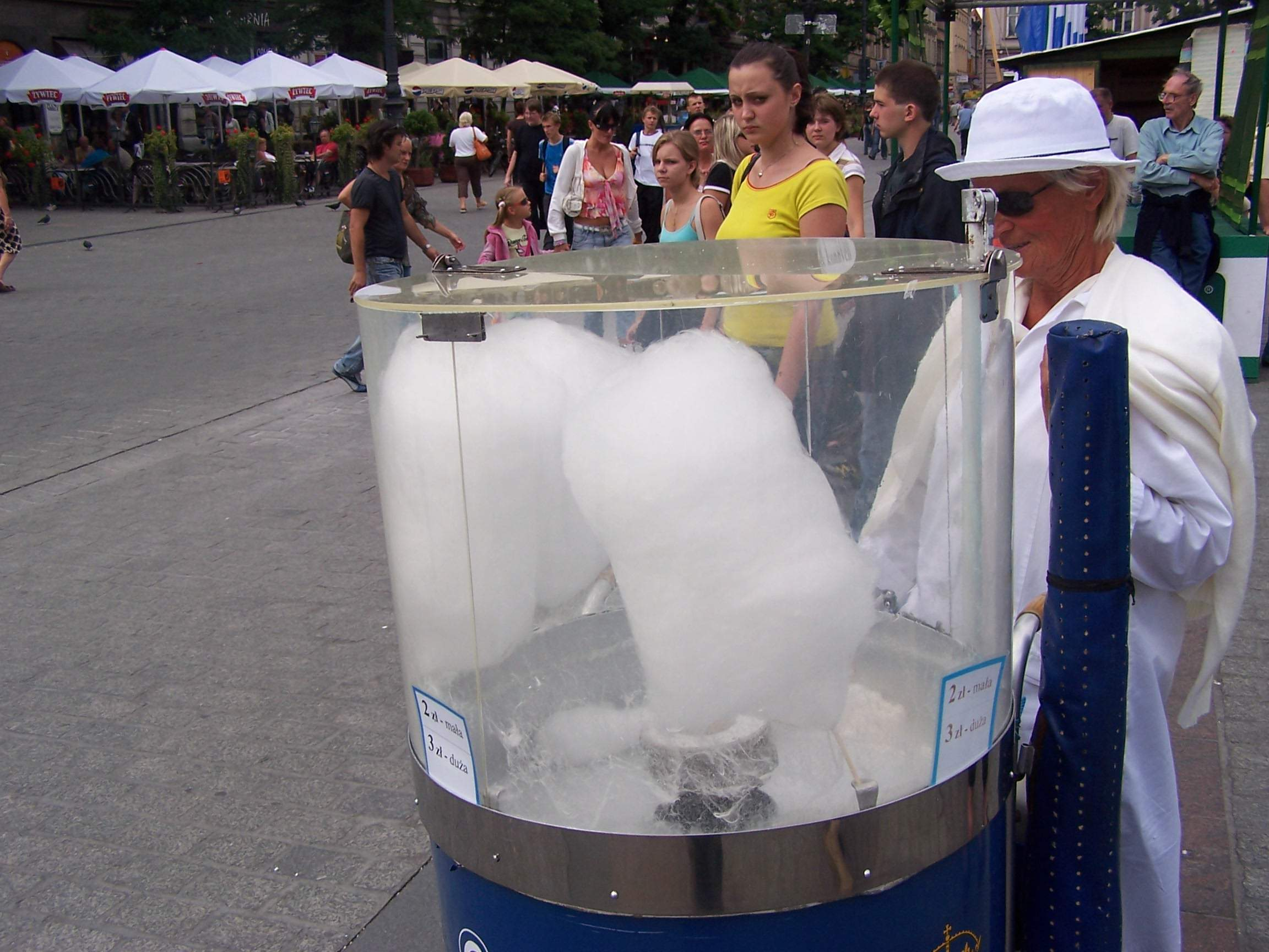 Photo by Piotrus. wata curkowa vendor at Sukiennice, Kraków, Poland.